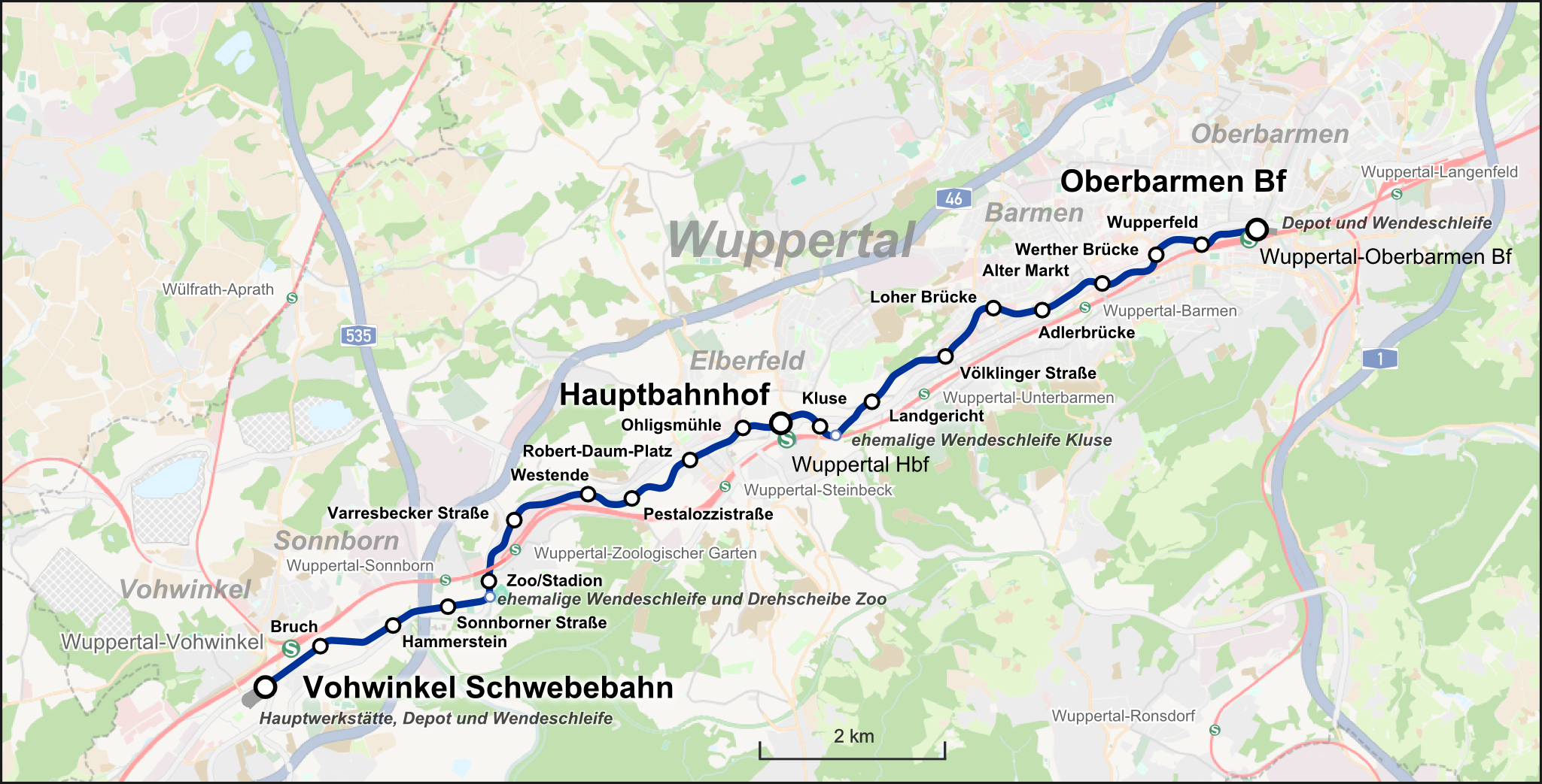 Karte der Wuppertaler Schwebebahn, Zustand im Jahr 2006